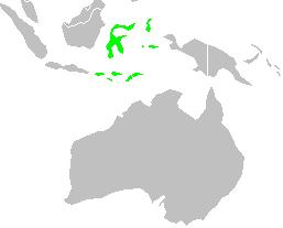 L. molucca